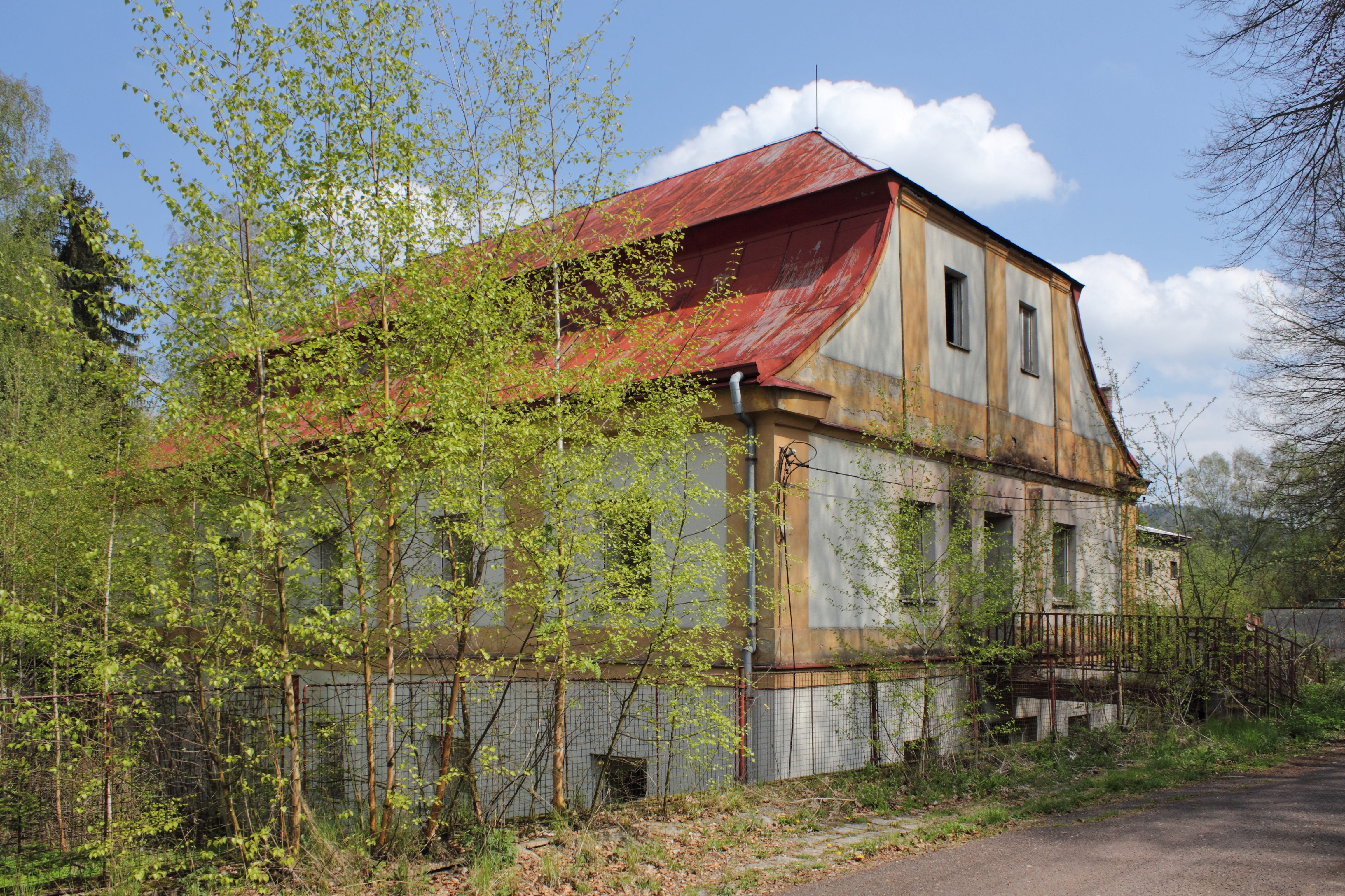 Dobrošov, Náchod